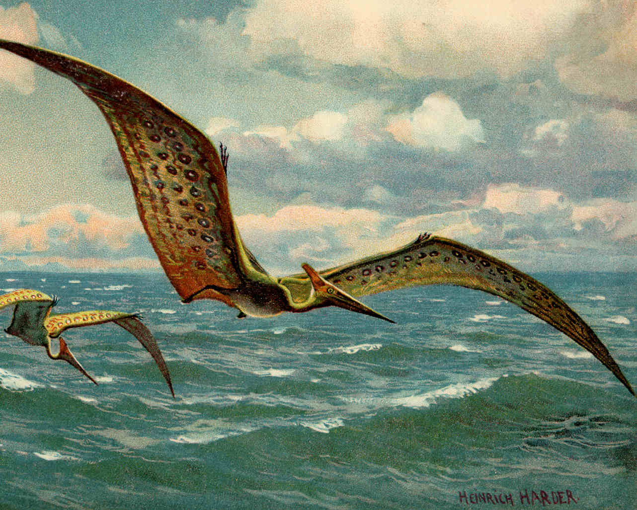 Pteranodon